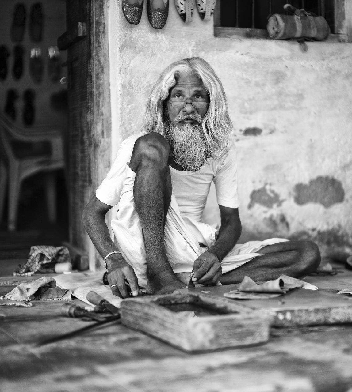 Rajasthan